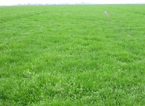 Sogar in solchem artenarmen Intensivgrünland in den Niederlanden brüten Uferschnepfen - meist jedoch mit wenig Erfolg. intensiv bewirtschaftete Wiese.